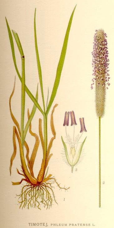 Timotej (Phleum pratense)